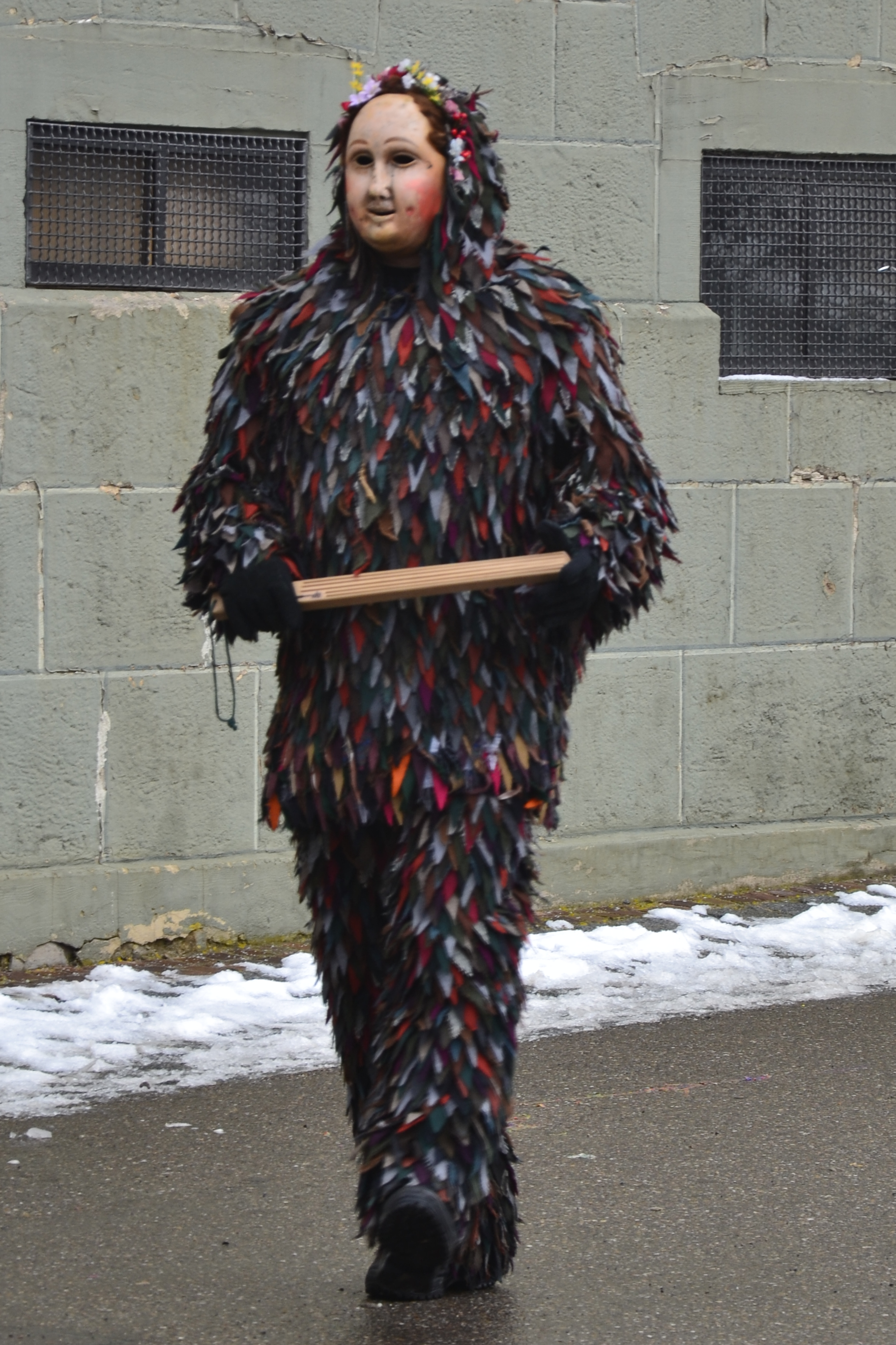 Narrenzunft Pflumeschlucker Bonndorf; Narrenfigur: Fotzli Hansele (Einzelfigur)